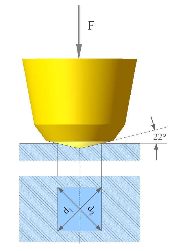 Skizze Vickers Härte Hardness